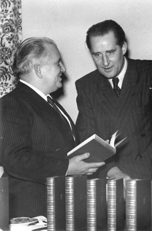 Illus-Rudolph 5.1.51 1. Buchserie fortschrittlicher Schriftsteller erscheint. Die ersten zehn Bände der Bibliothek fortschrittlicher Schriftsteller, die nach der Kulturverordnung der DDR vom 16.3.50 herausgegeben wird, erscheinen jetzt. Aus diesem Anlass fand am 5.1.51 im Kulturbundhaus in Berlin eine Pressekonferenz statt. UBz: Willi Bredel (links) im Gespräch mit dem Direktor der Akademie der Künste, Dr. Engel (rechts).